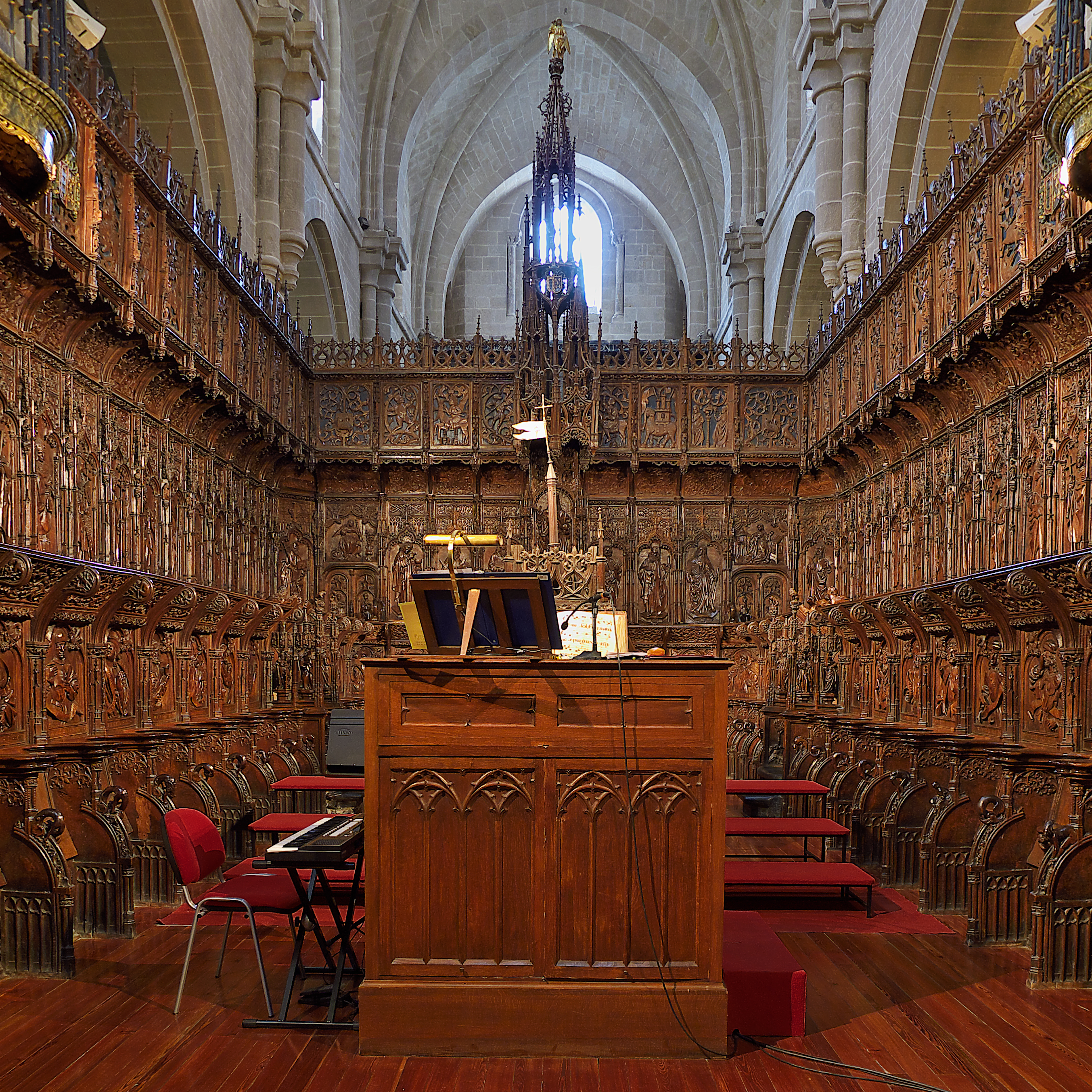 El cabildo catedralicio de la Catedral de Zamora decide la contratación de la sillería del coro, siendo elegido el taller de Juan de Bruselas (Jan Yneres), que la termina en el año 1505 en madera de nogal y amplio e interesante programa iconográfico.